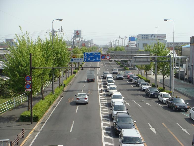 香川県高松市上天神町。上天神交差点歩道橋より撮影した国道193号空港通り。